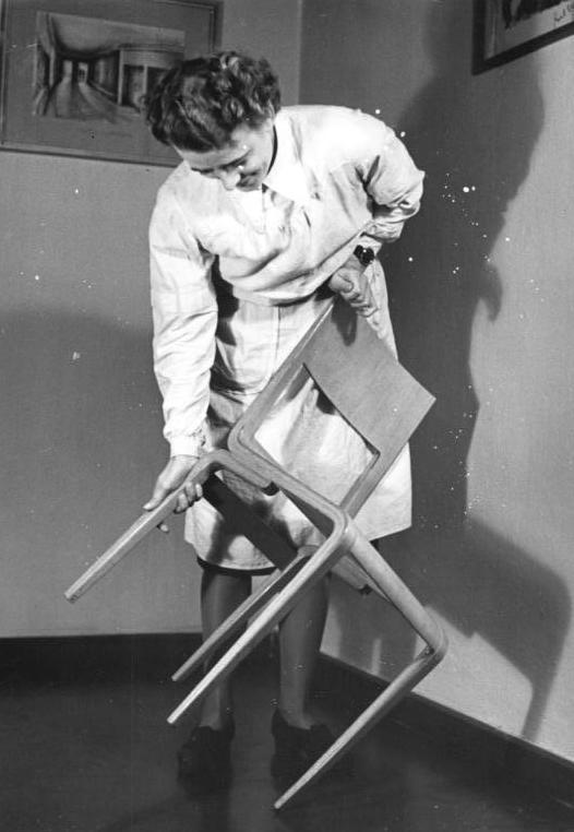 Dresden, Möbelfabrik, Stuhl aus Sperrholz Illus Junge 13.12.1951 Deutsche Werke in Hellerau bei Dresden - VEB Möbelbau. Im Betrieb wurde ein neuer Stuhl entwickelt, der aus kleinsten beleimten Fournieren gepresst wird. Dieser neue Stuhl ist für den Bürobetrieb sehr gut geeignet.